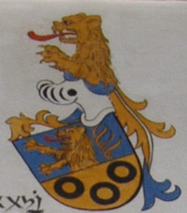 Wappen des Rittergeschlecht Schaffer / Schaller.